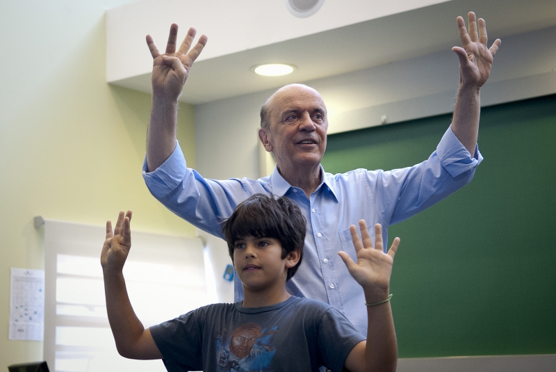 O candidato à prefeitura pelo PSDB, José Serra, vota junto de seu neto Antônio no segundo turno das eleições municipais de 2012.